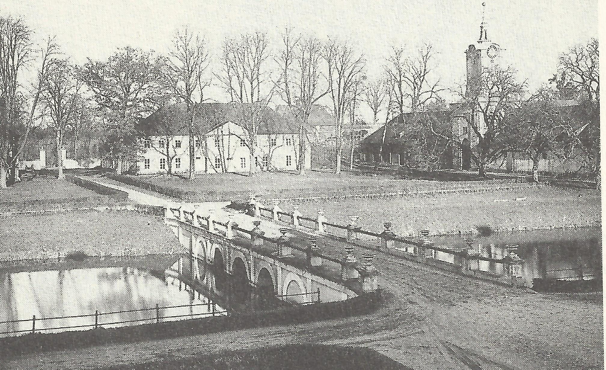 Schloss Schlobitten, Blick in den Ehrenhof (1720, Barock) mit Marstall, ehemaliger Brauerei und Grauem Tor, etwa 1915. Abgesehen von den königlichen Schlössern gab es ind Brandenburg-Preußen keine zweite Anlage von solcher Größe und formalem Anspruch